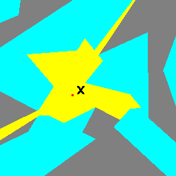 Illustration de la fonction étoile de X dans R2 (X : jaune et cyan, St(X) : jaune)